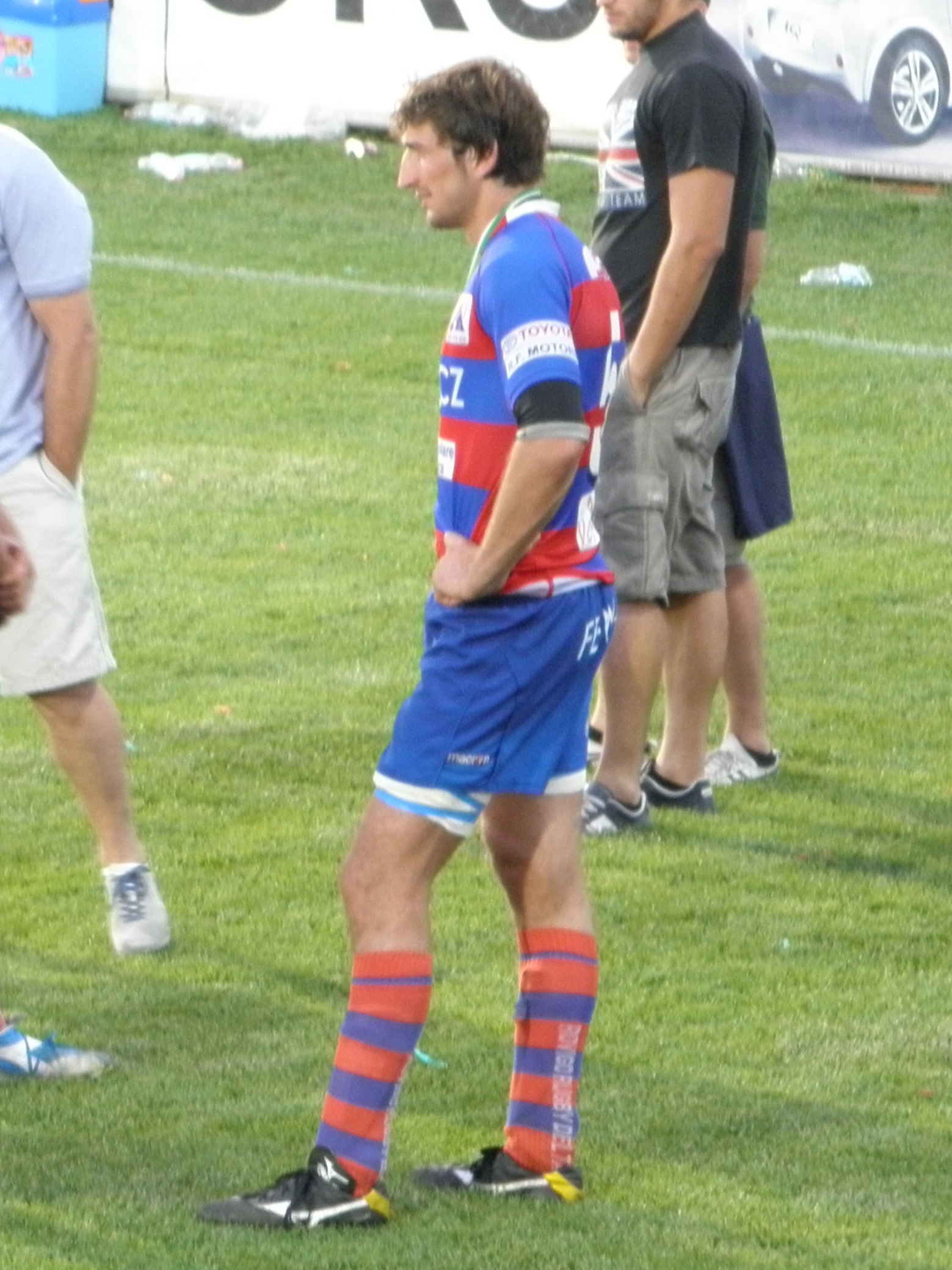 Rovigo, 28 maggio 2011: Campionato di Eccellenza di rugby a 15 2010-2011.Jean-François Montauriol al termine della partita.